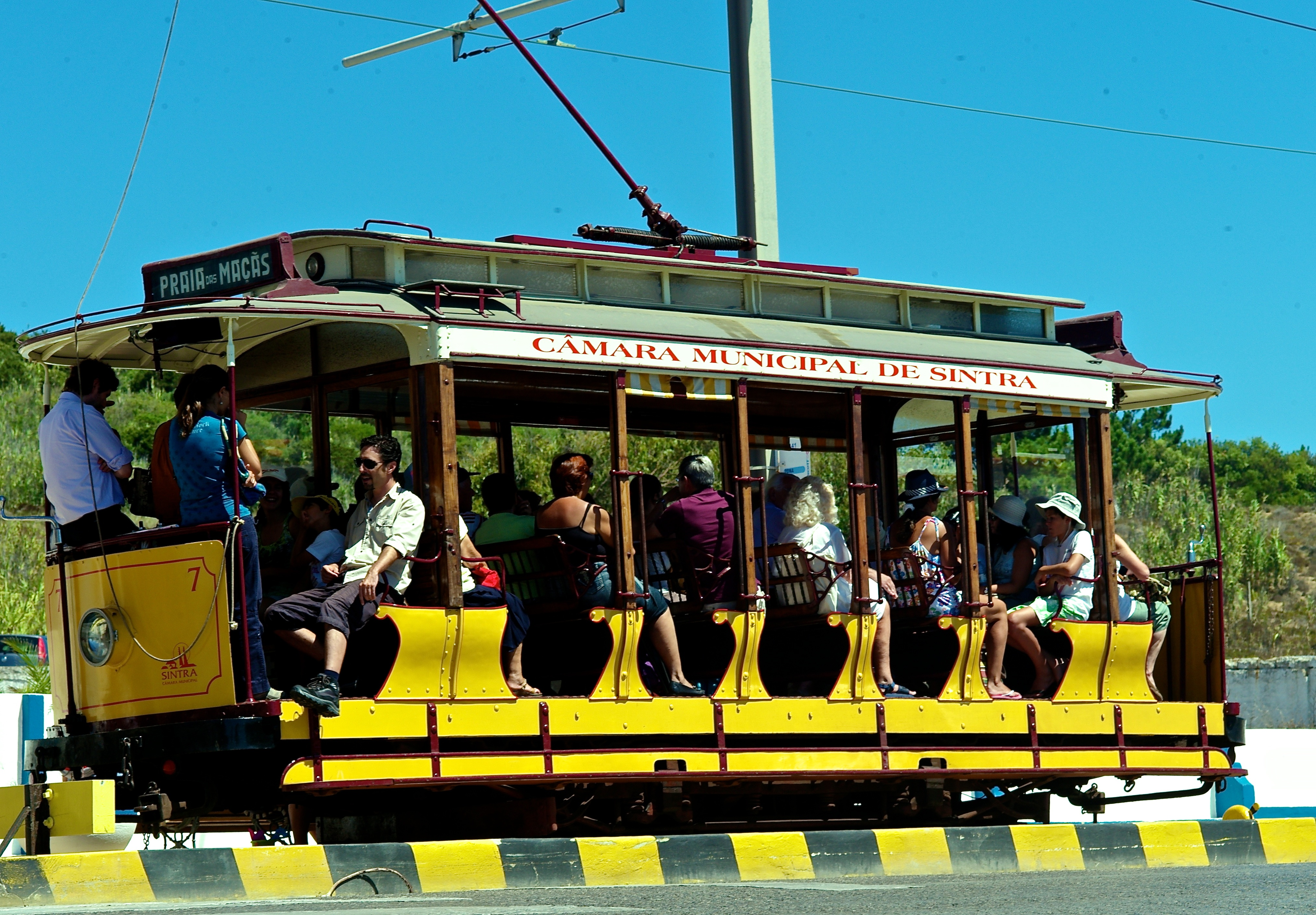 Praia das Maçãs, Sintra, Portugal